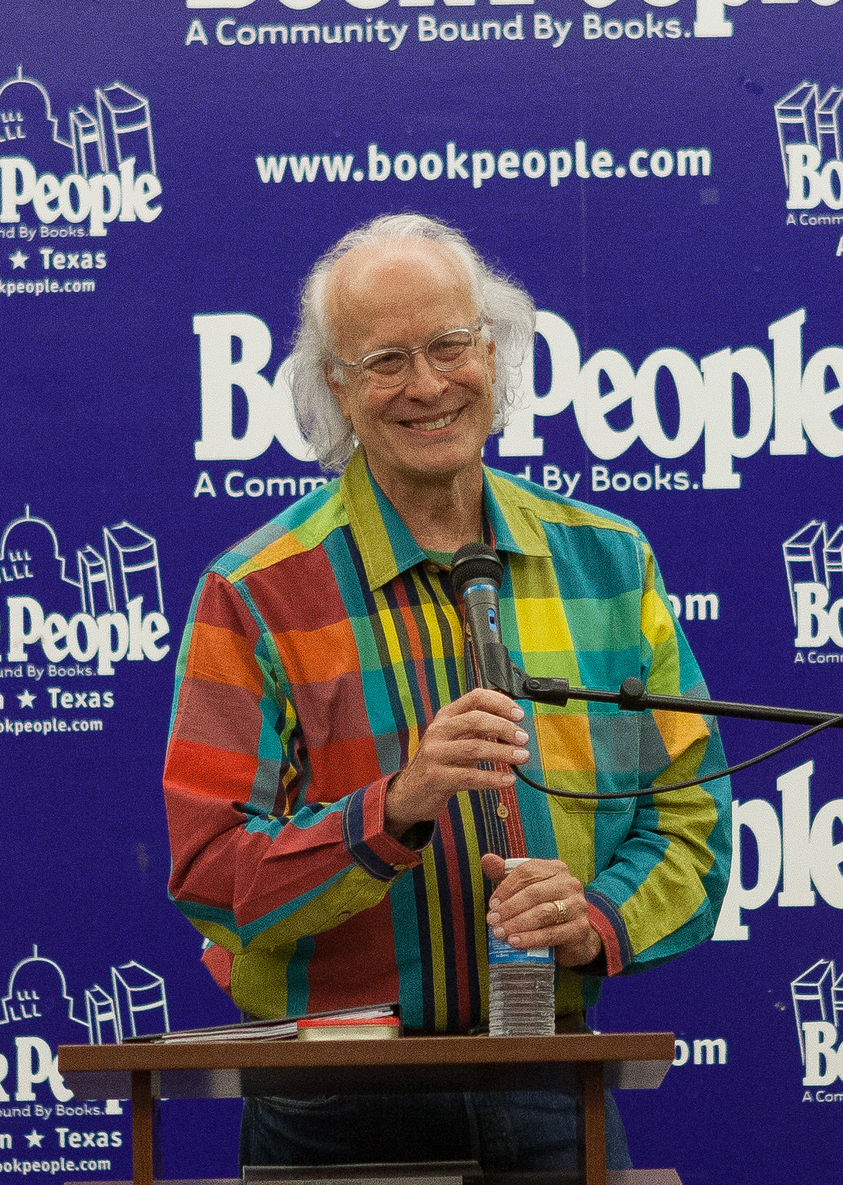 David Gaines booksigning-reading-9571.jpg